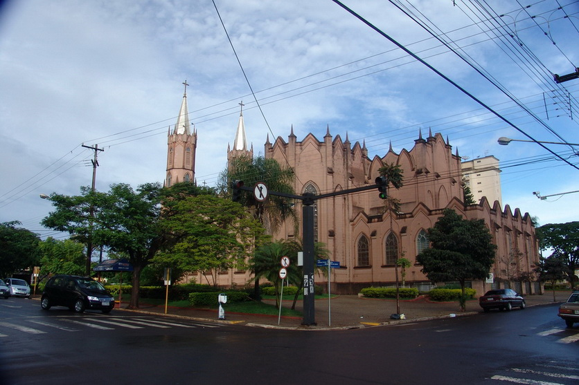 Imagem do município de Ourinhos, estado de São Paulo, Brasil.